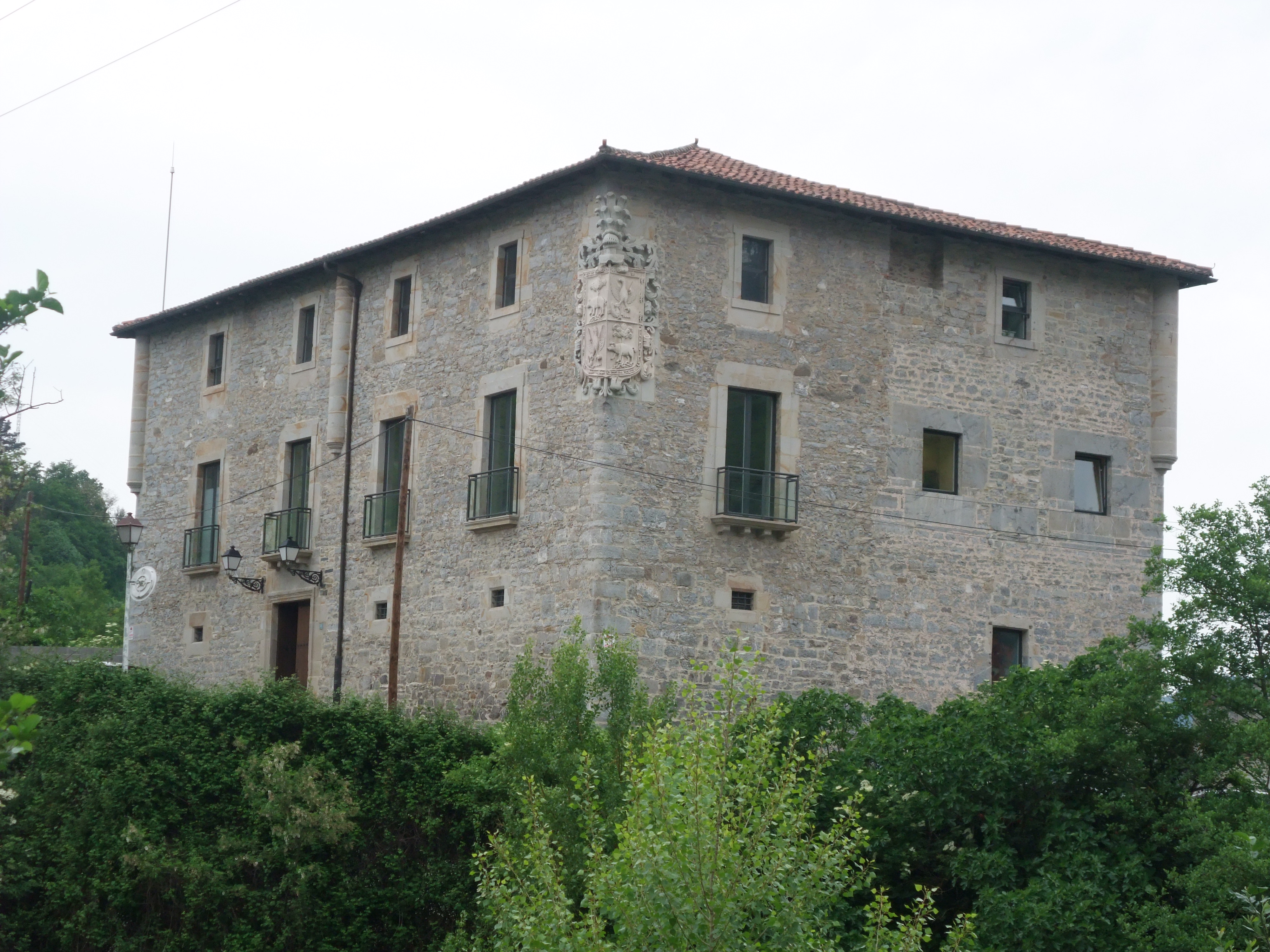 Vergara (Guipúzcoa)-Torre de Gabiria-1